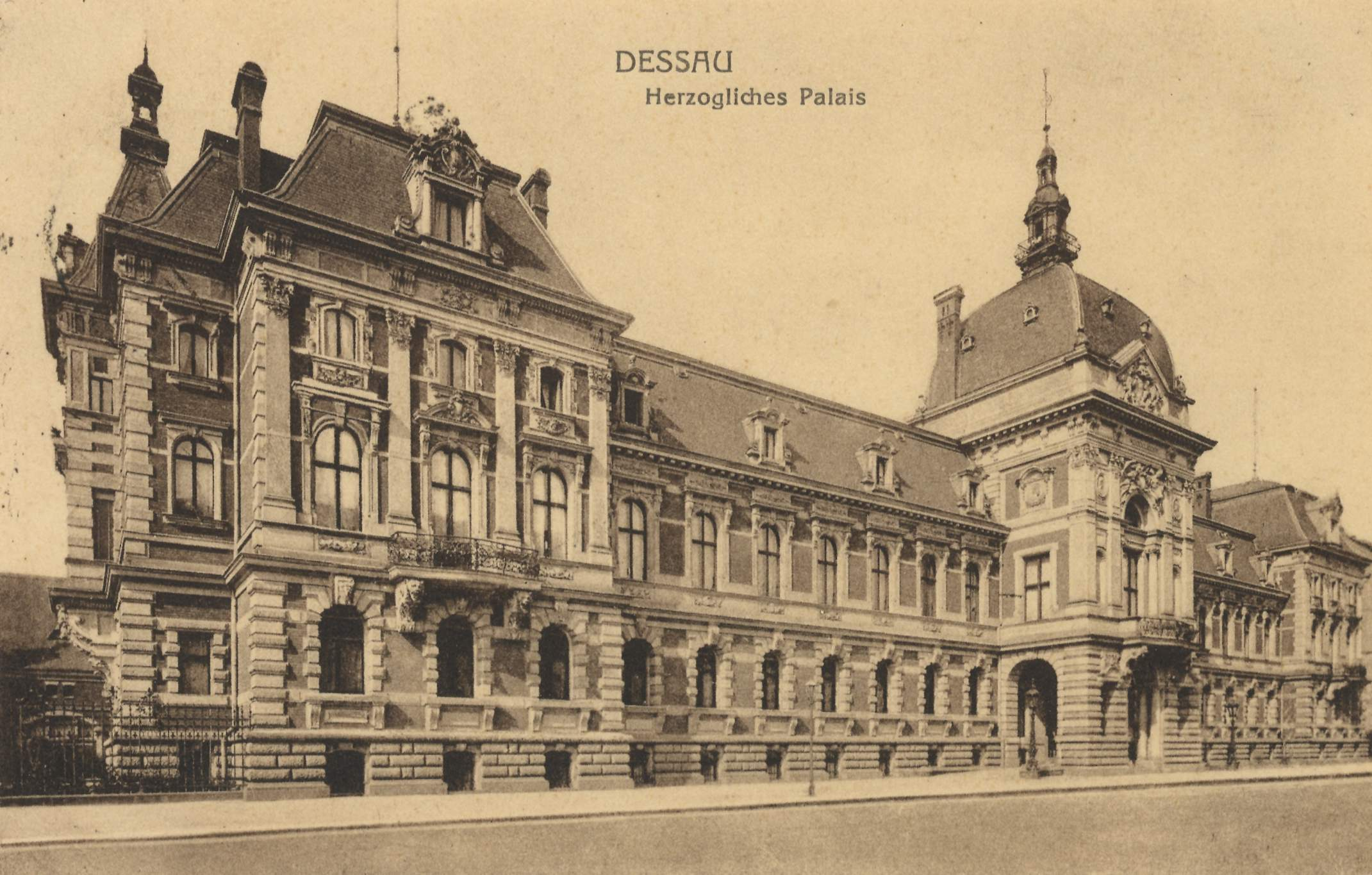 Herzogl. Palais